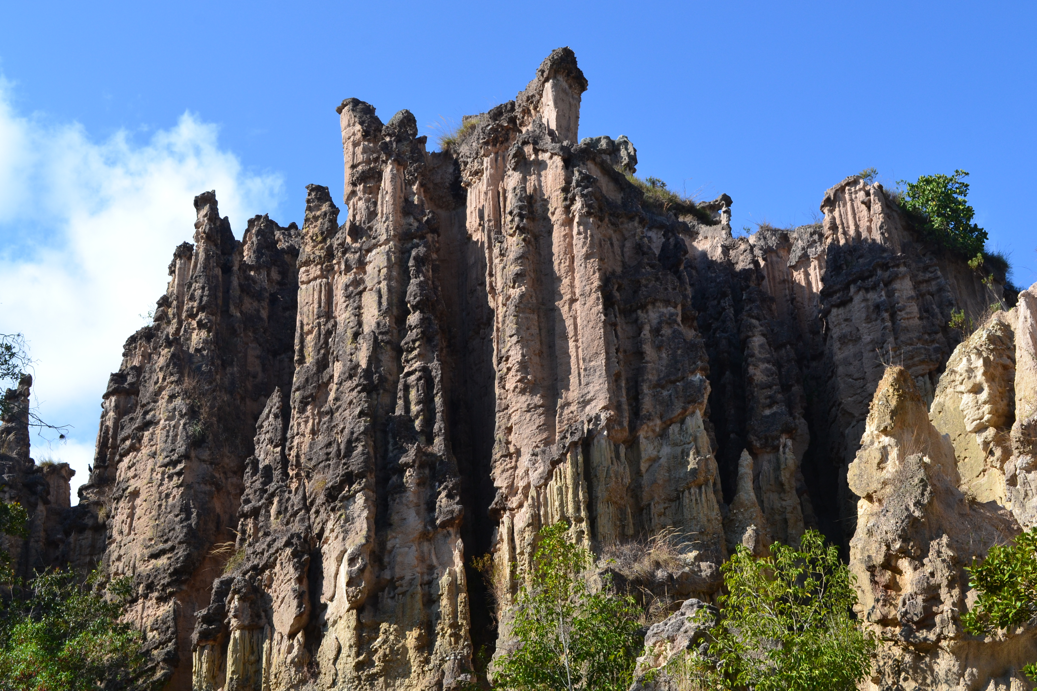 Área Natural Única Los Estoraques Esta fotografía fue tomada en un área protegida de Colombia con el código 17 del RUNAP.